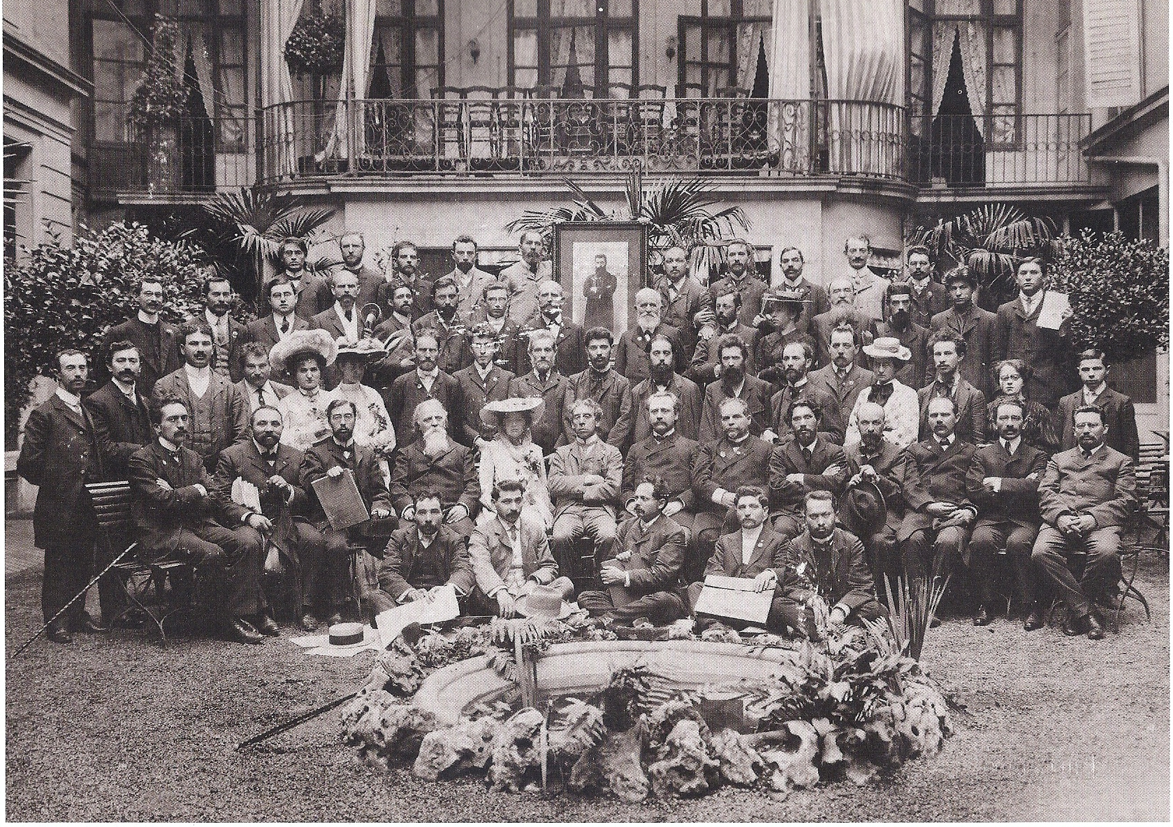 ההסתדרות הטריטוריאליסטית, מתוך ארכיון השומר הצעיר, יד יערי